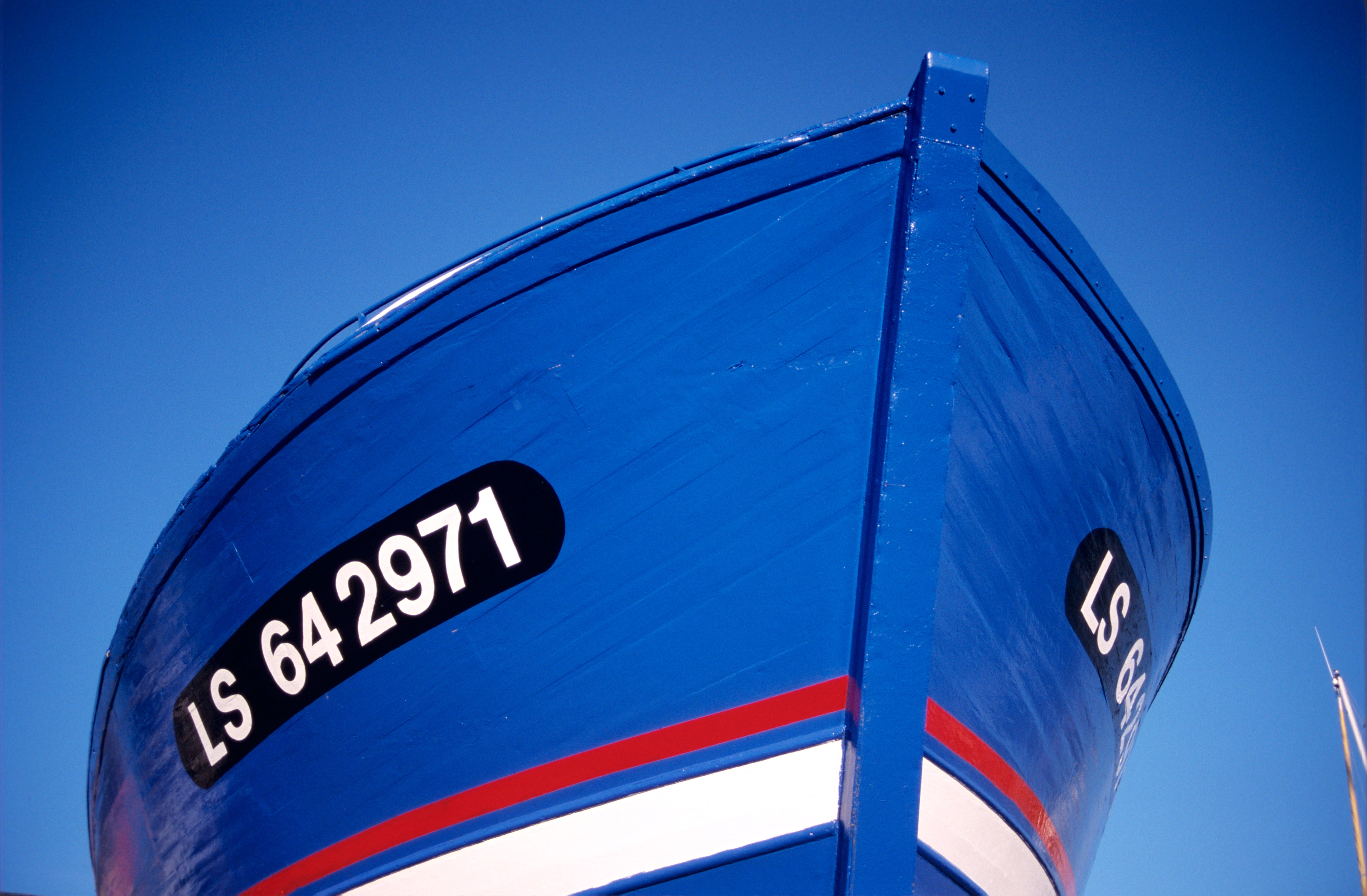 La proue et la coque juste repeintes du chalutier hauturier "La Petite Majorie" immatriculé LS 642971 aux Sables d' Olonne. Plateau Nautique de La Rochelle. La Rochelle, Charente Maritime, France.